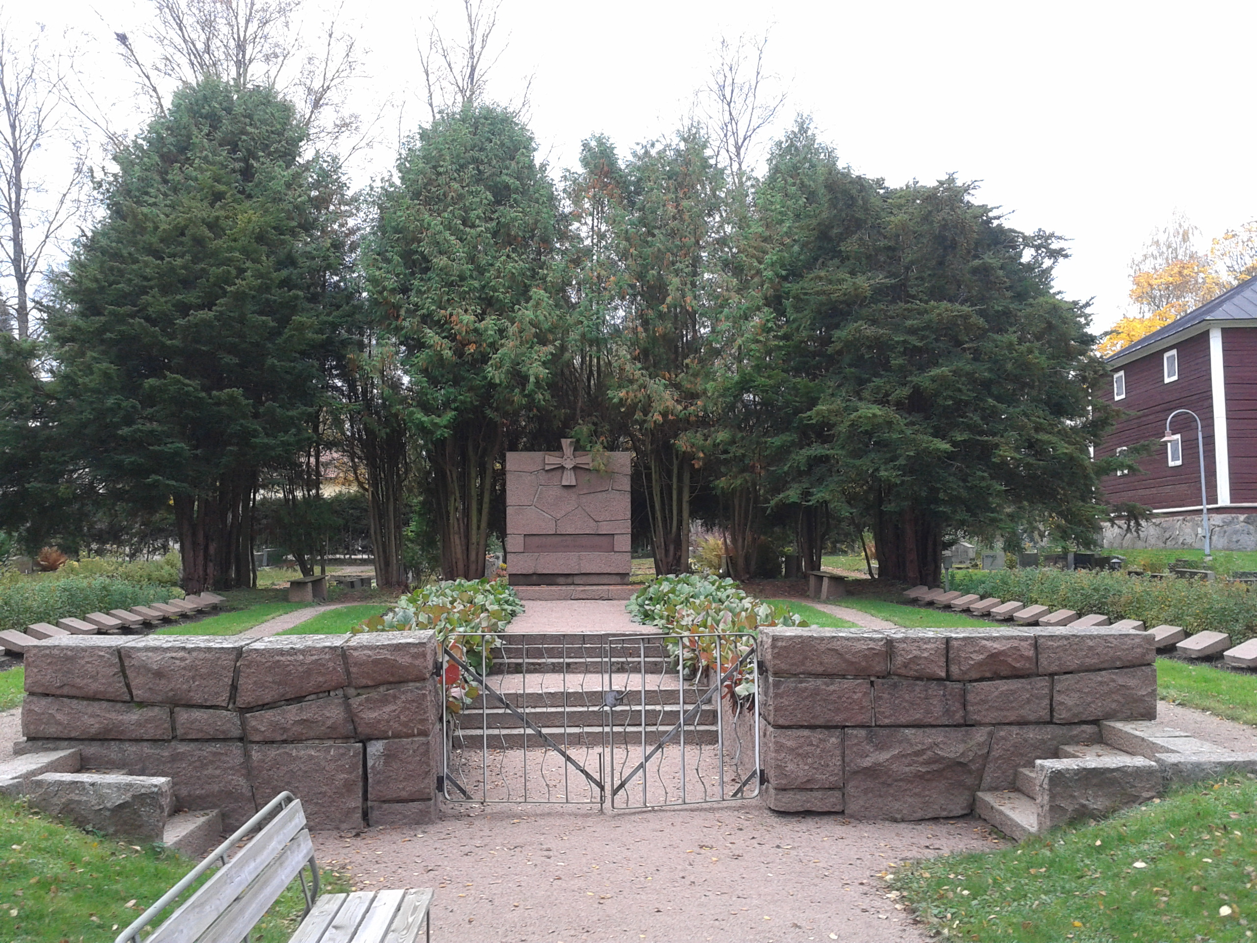 Hämeenlinna Vanajan kirkon sankarihaudat kesällä 2012